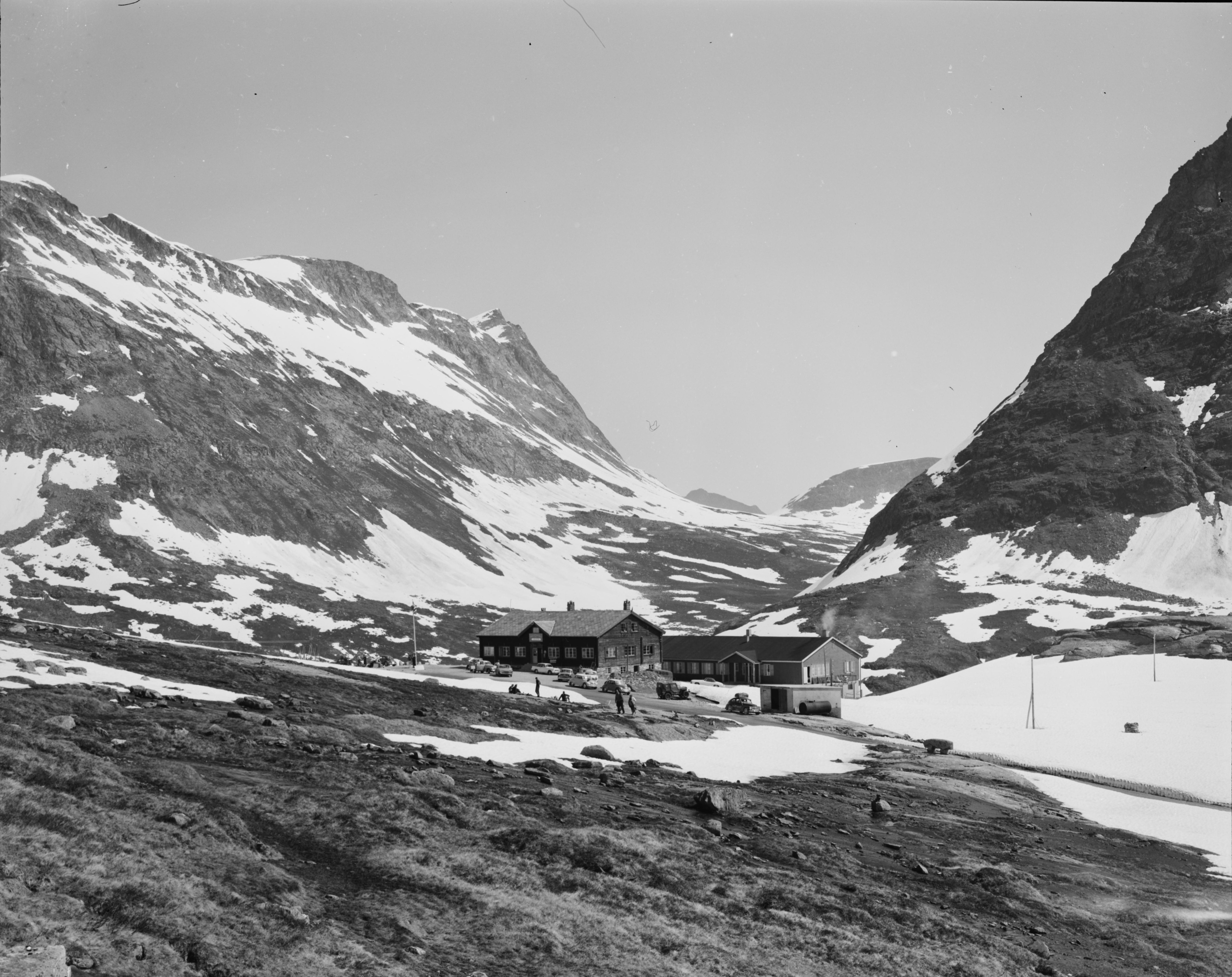 Bildet er hentet fra Nasjonalbibliotekets bildesamling. Anmerkninger til bildet var: fotograf: Å.M. Trollstigheimen, Rauma, Møre og Romsdal